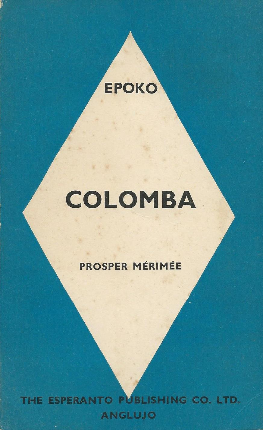 librokovrilo de "Colomba", 1938